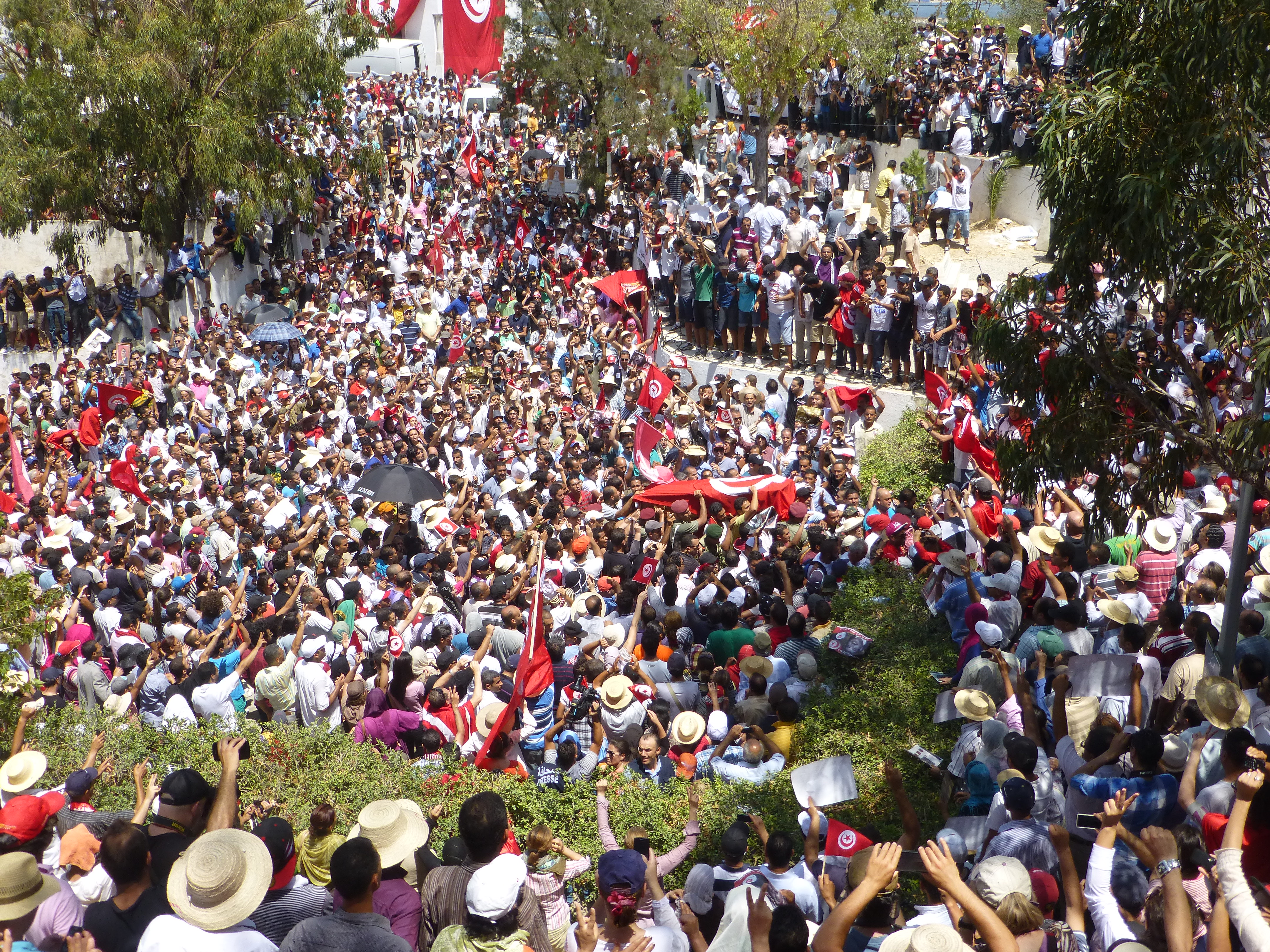 Cérémonie d'enterrement de Mohamed Brahmi dans le carré des Martyrs du cimetière El Jallaz, Tunis